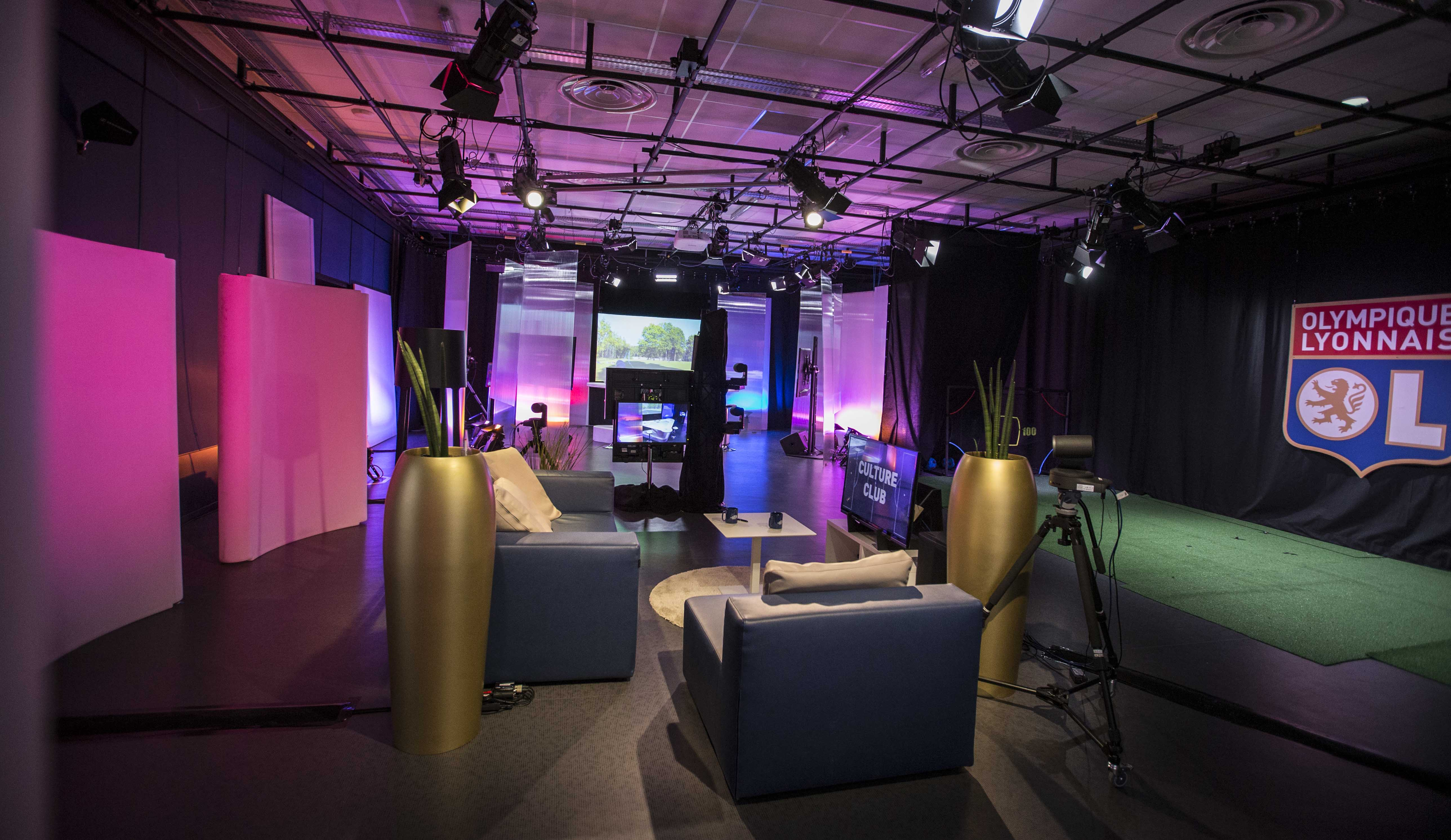 Sur une surface de 260m², nos animateurs et journalistes disposent de plateaux adaptables et spacieux.